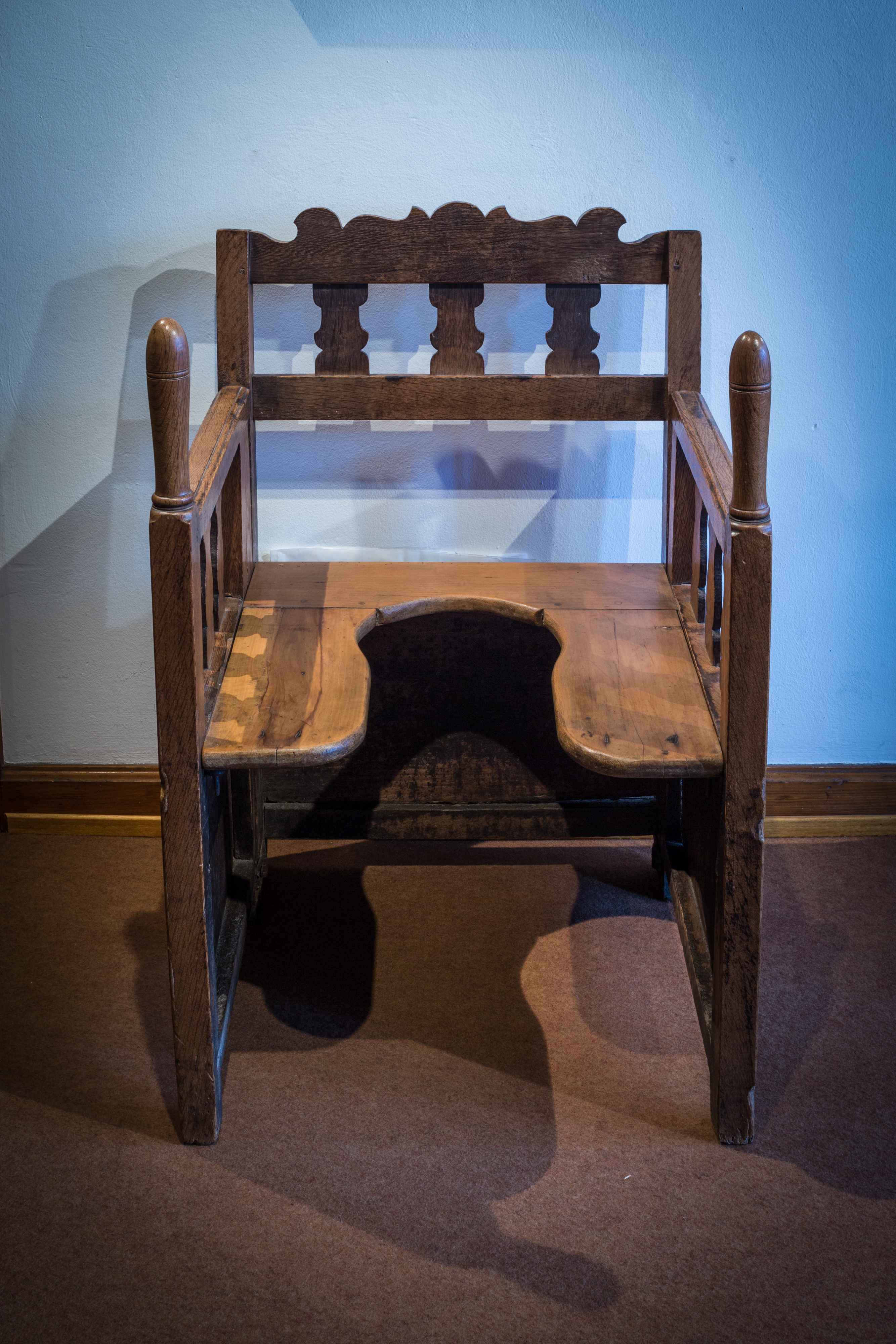 Chaise d'accouchement. L'assise échancrée permet à la sage-femme de saisir le bébé lors de son apparition, les poignées servent à la future mère à s'agripper pendant ses contractions. Massif et solide, ce siège a été utilisé longtemps, car plusieurs parties ont été modifies avec des bois différents. 19e siècle. Musée alsacien de Strasbourg